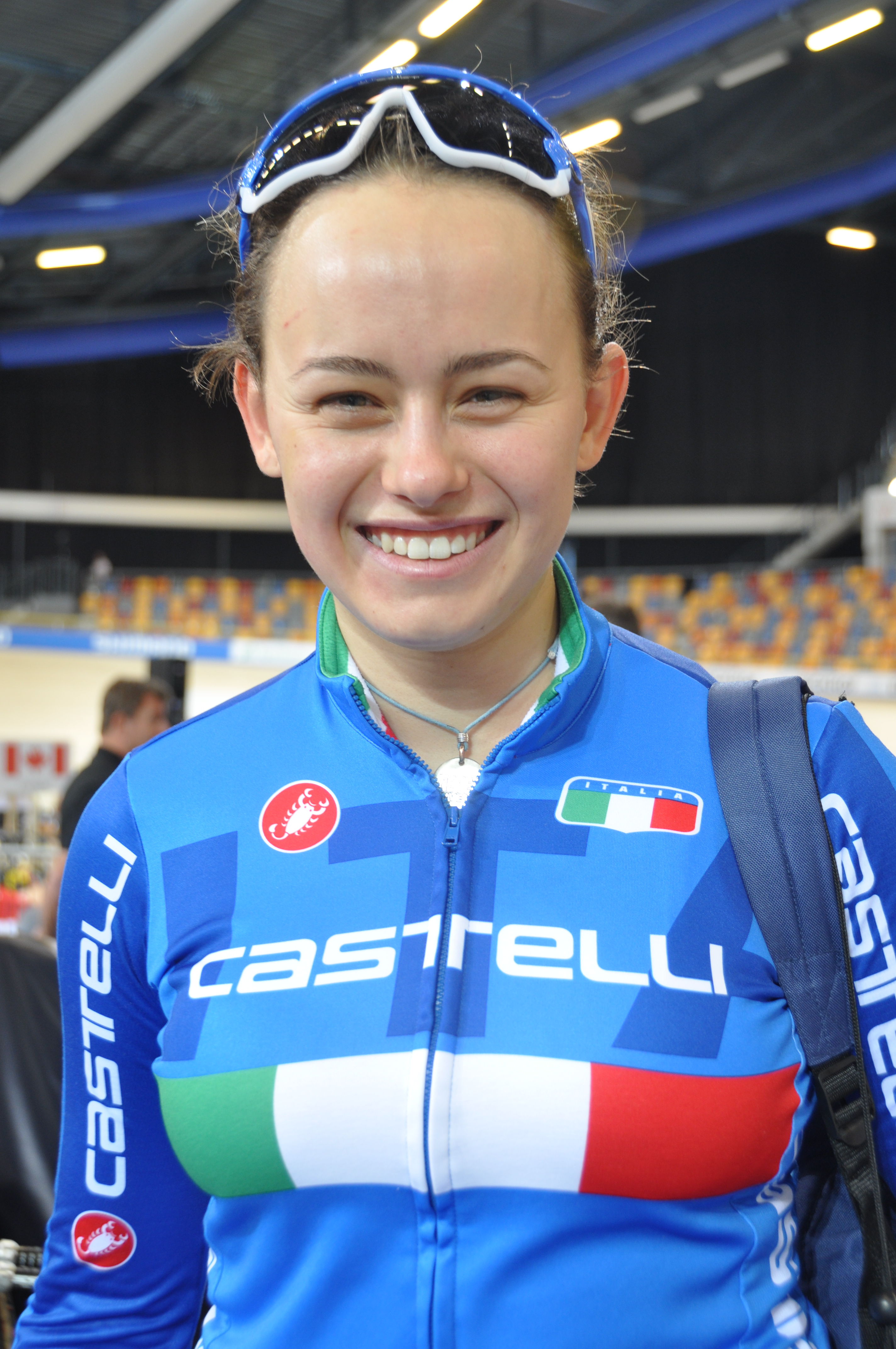 Gloria Manzoni, ital. Radsportlerin